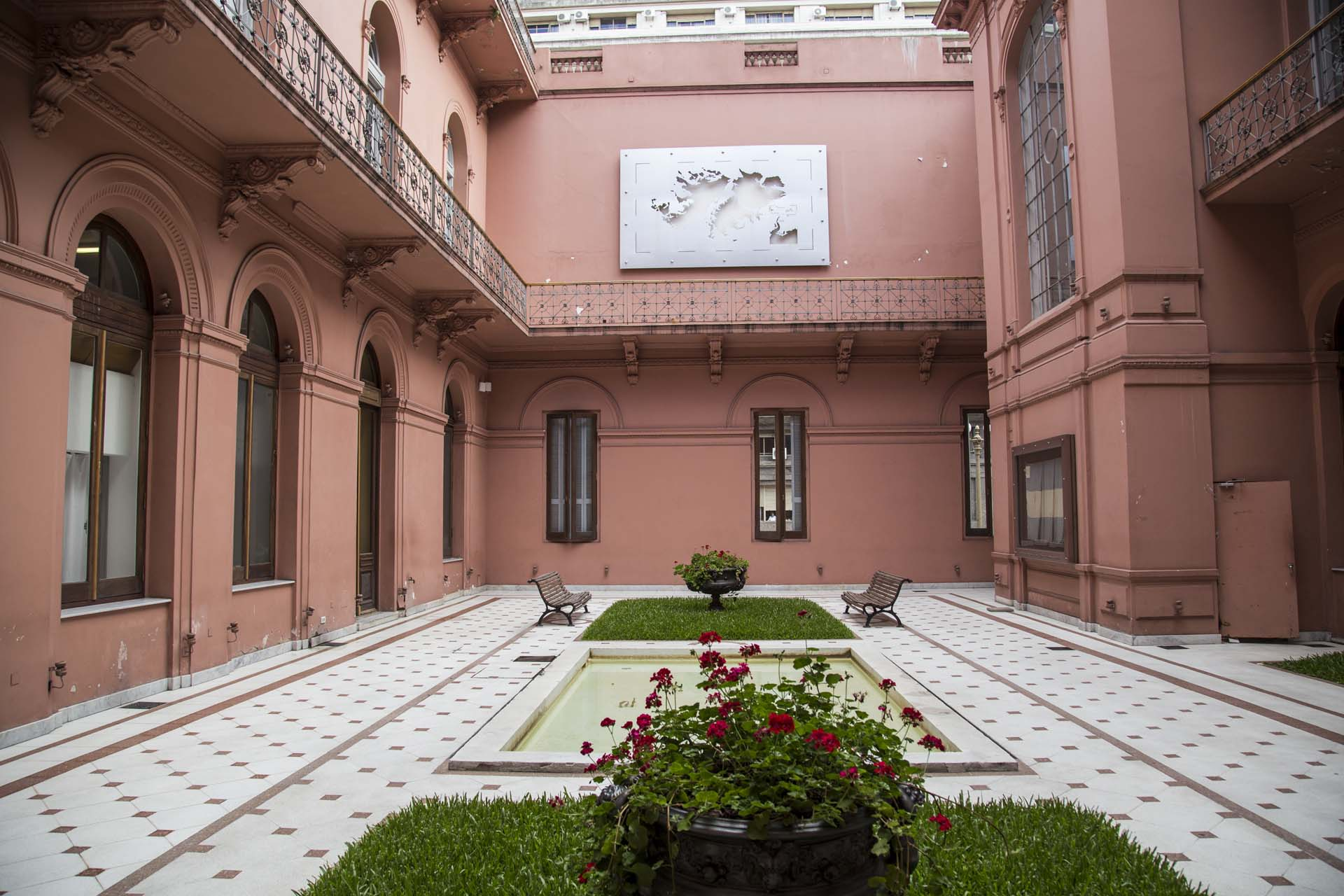 Fue inaugurado el 2 de mayo de 2012, en el 30° aniversario del hundimiento del crucero ARA General Belgrano, que provocó la muerte de 323 marinos durante el conflicto del Atlántico Sur. Es un homenaje y reconocimiento a los combatientes que participaron de la contienda bélica en las islas. Este espacio fue recuperado con la reconstrucción del piso original y la unificación de su color, que es el del exterior de la casa. En el centro de ese patio, se instaló una fuente y dos grandes maceteros en forma de copones. Preside el espacio una escultura realizada en aluminio con el contorno de las Islas Malvinas.